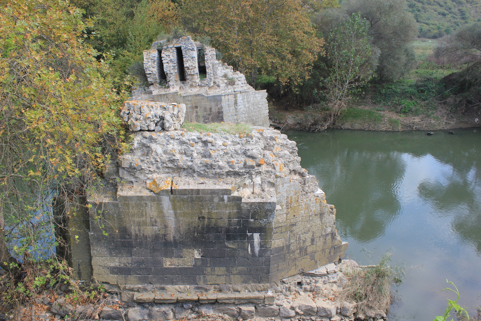 Die Überreste der spätantiken Aiseposbrücke zwischen Biga und Bandırma in der nordwestlichen Türkei.